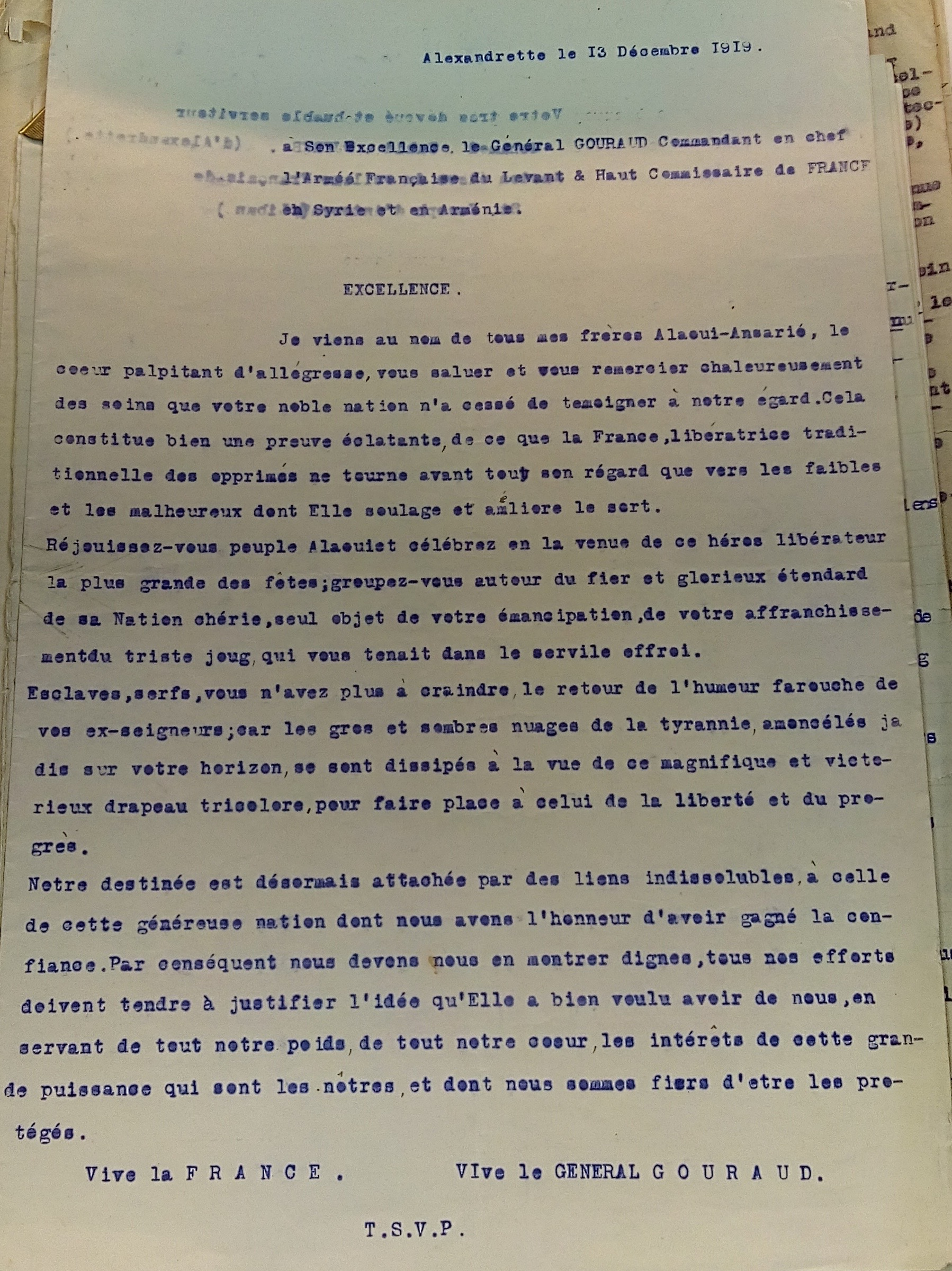 Original du discours de réception d'un notable alaouite à l'arrivée de Henri Gouraud le 13 décembre 1919 à Alexandrette. (La Courneuve, Fonds Gouraud, Carton 399 PAAP/151